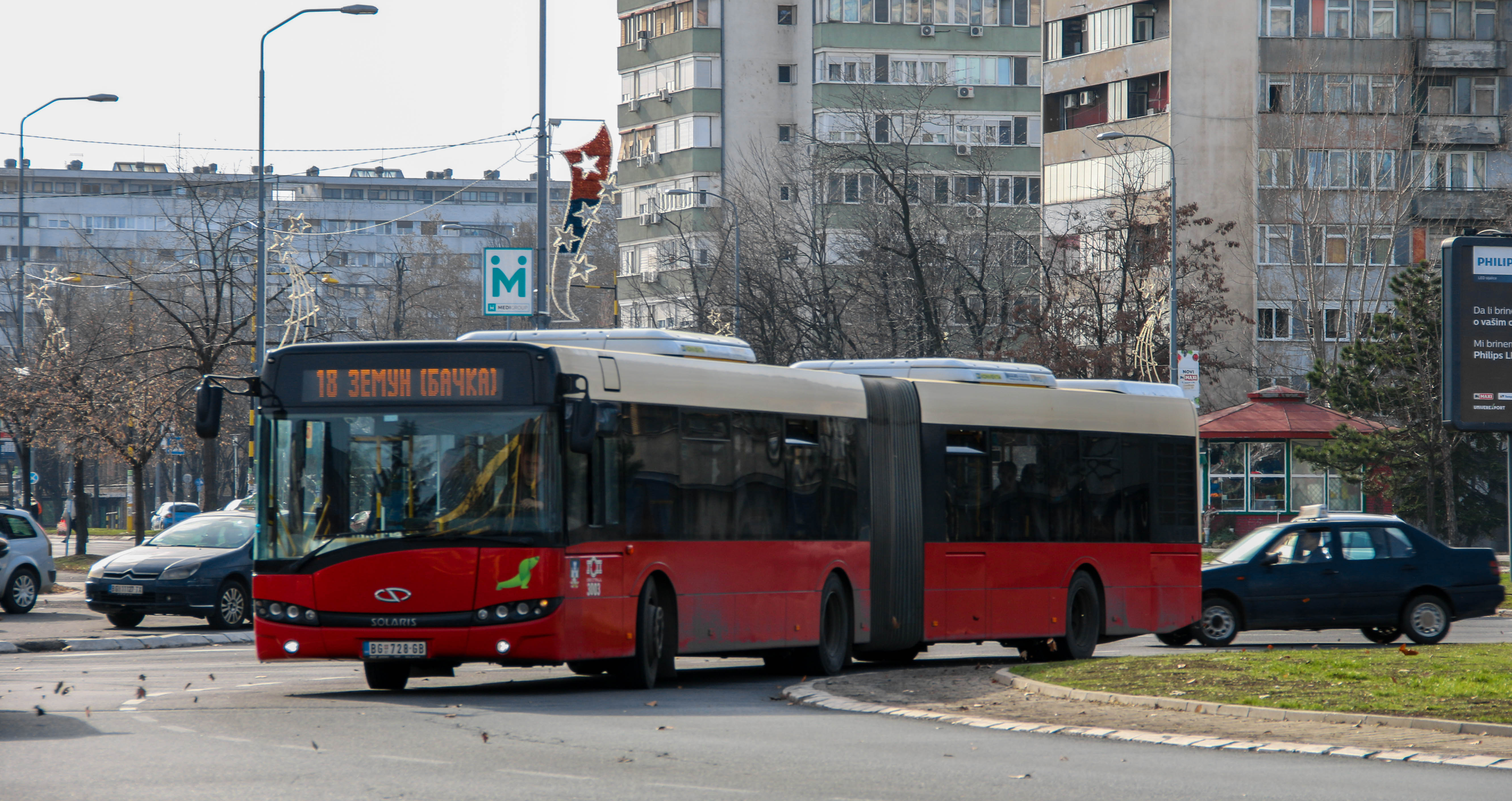 Solaris Urbino 18 Beograd